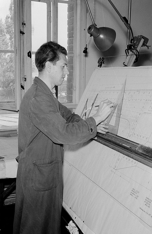 Original image description from the Deutsche Fotothek Portrait eines Bauzeichners am Reißbrett